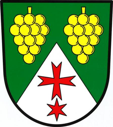 znak, Hodonice, okres Znojmo